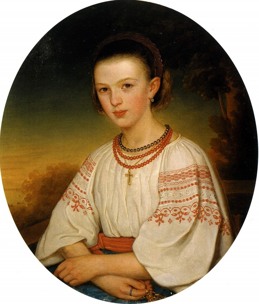 Портрет Елизаветы Михайловны Дараган